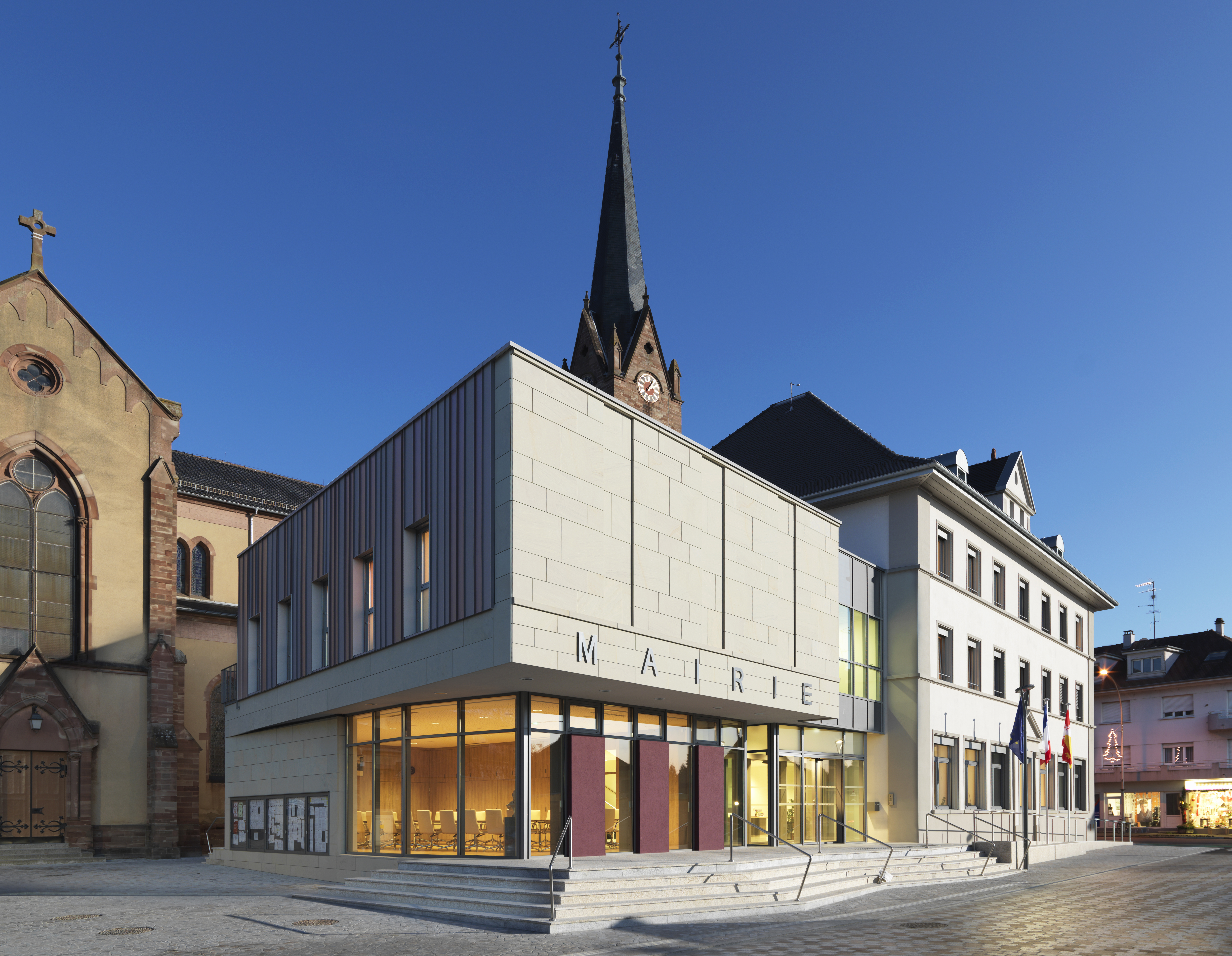 Mairie de Village-Neuf